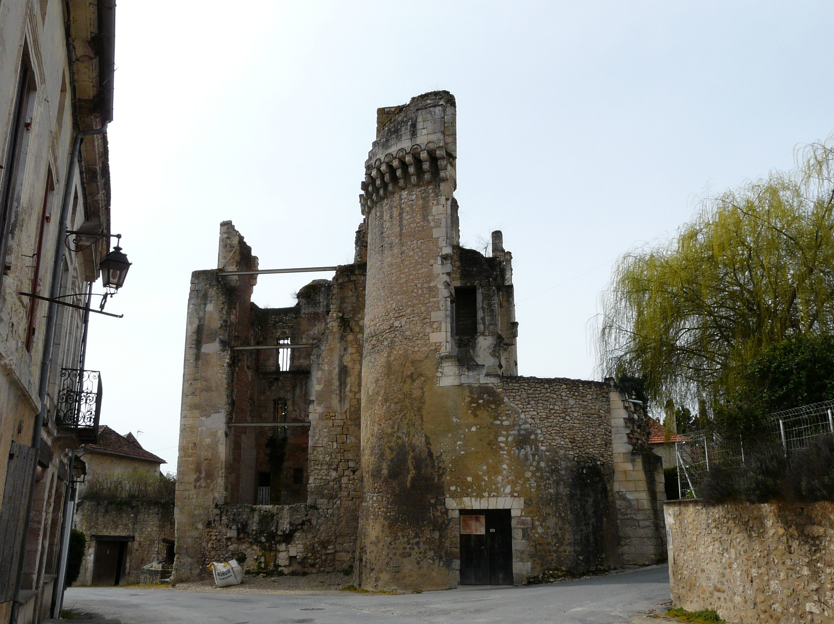 Les ruines du château Barrière, Villamblard, Dordogne, France.